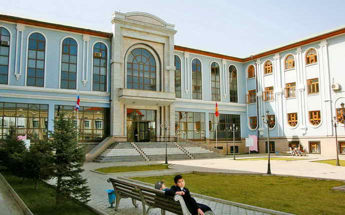 Oʻzbekcha/ўзбекча: Xalqlar Do'tligi Univesiteti